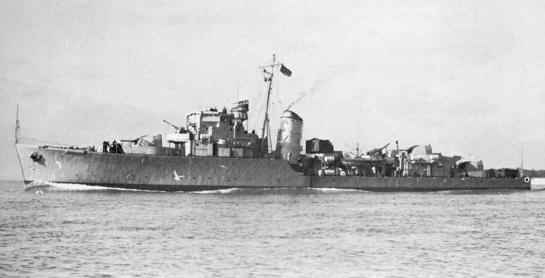 Der britische Geleitzerstörer HMS Oakley (II)